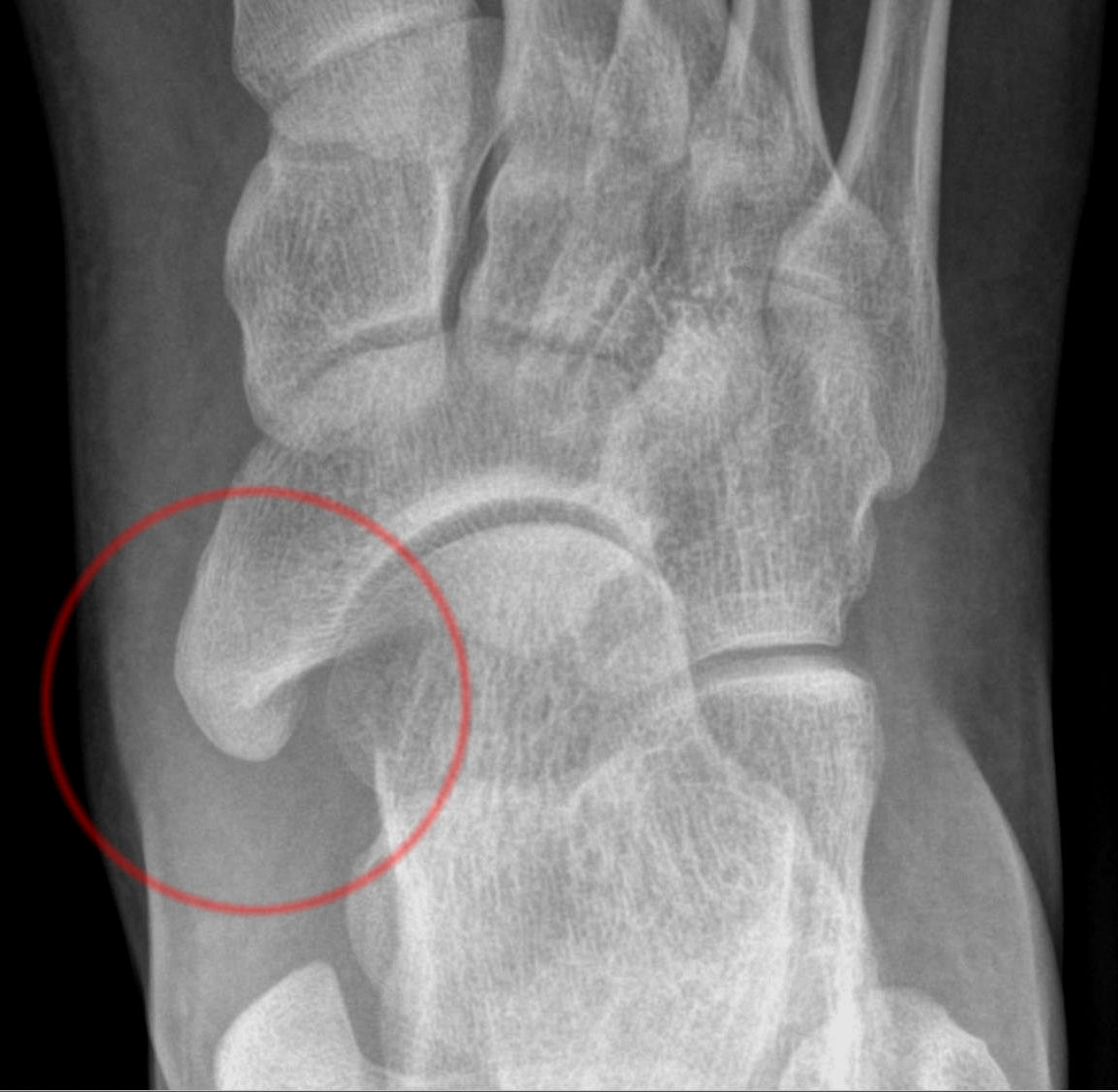 Os naviculare cornutum im Röntgenbild: Hakenförmige Ausziehung des medialen Rands des Os naviculare wie ein verschmolzenes Os tibiale externum (siehe Geist-Klassifikation).